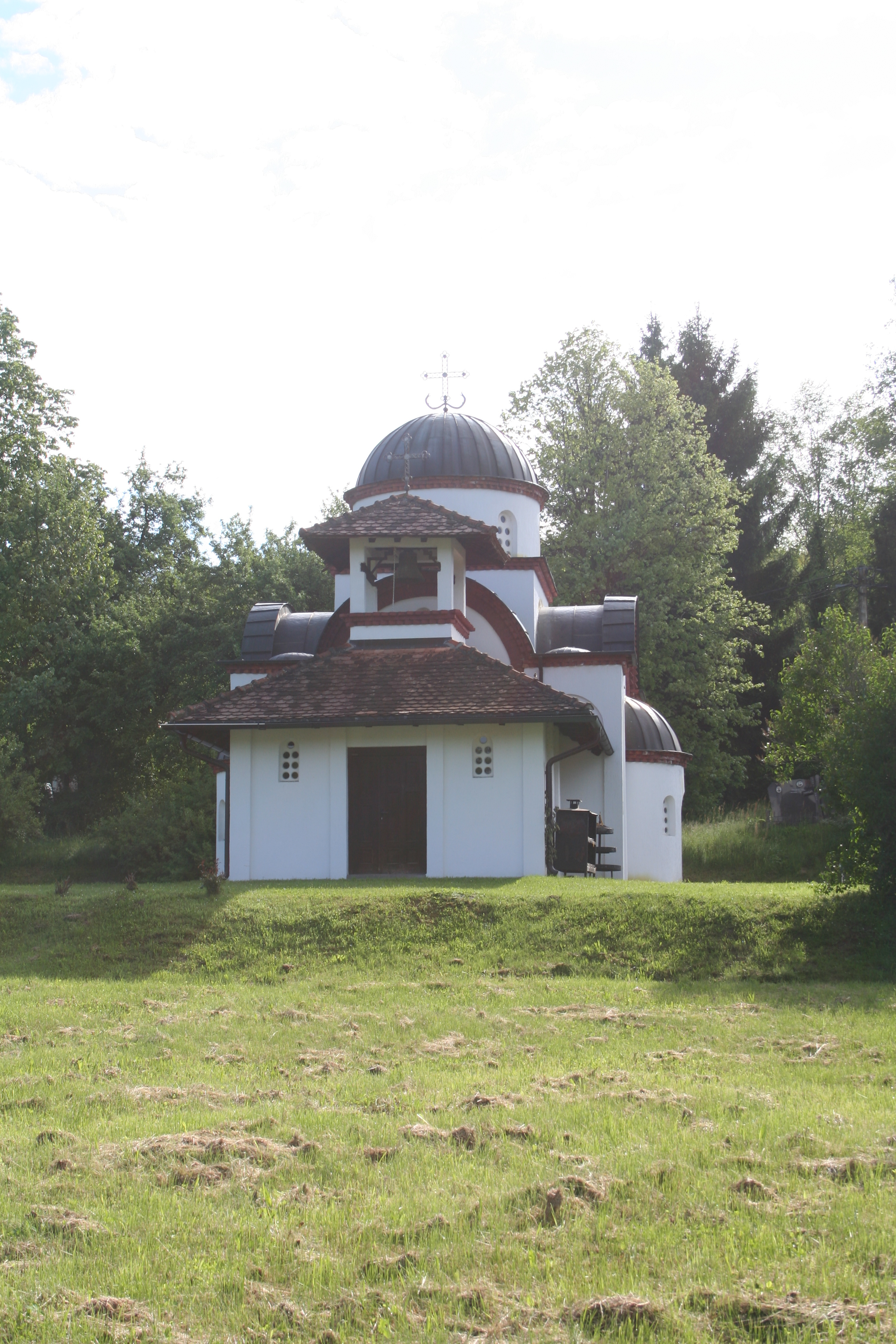 Crkva Sv. apostola Petra i Pavla, Komirić